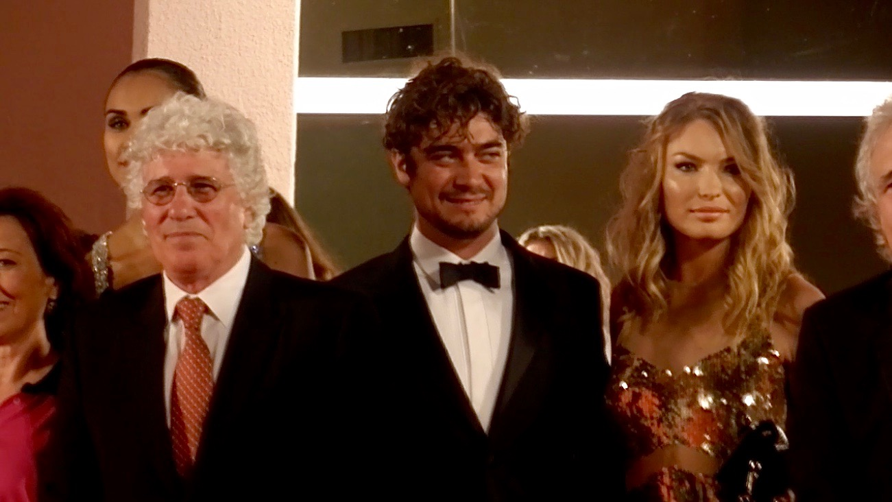 Ninetto Davoli e Riccardo Scamarcio alla premiére di "Pasolini" di Abel Ferrara al Festival di Venezia 2014